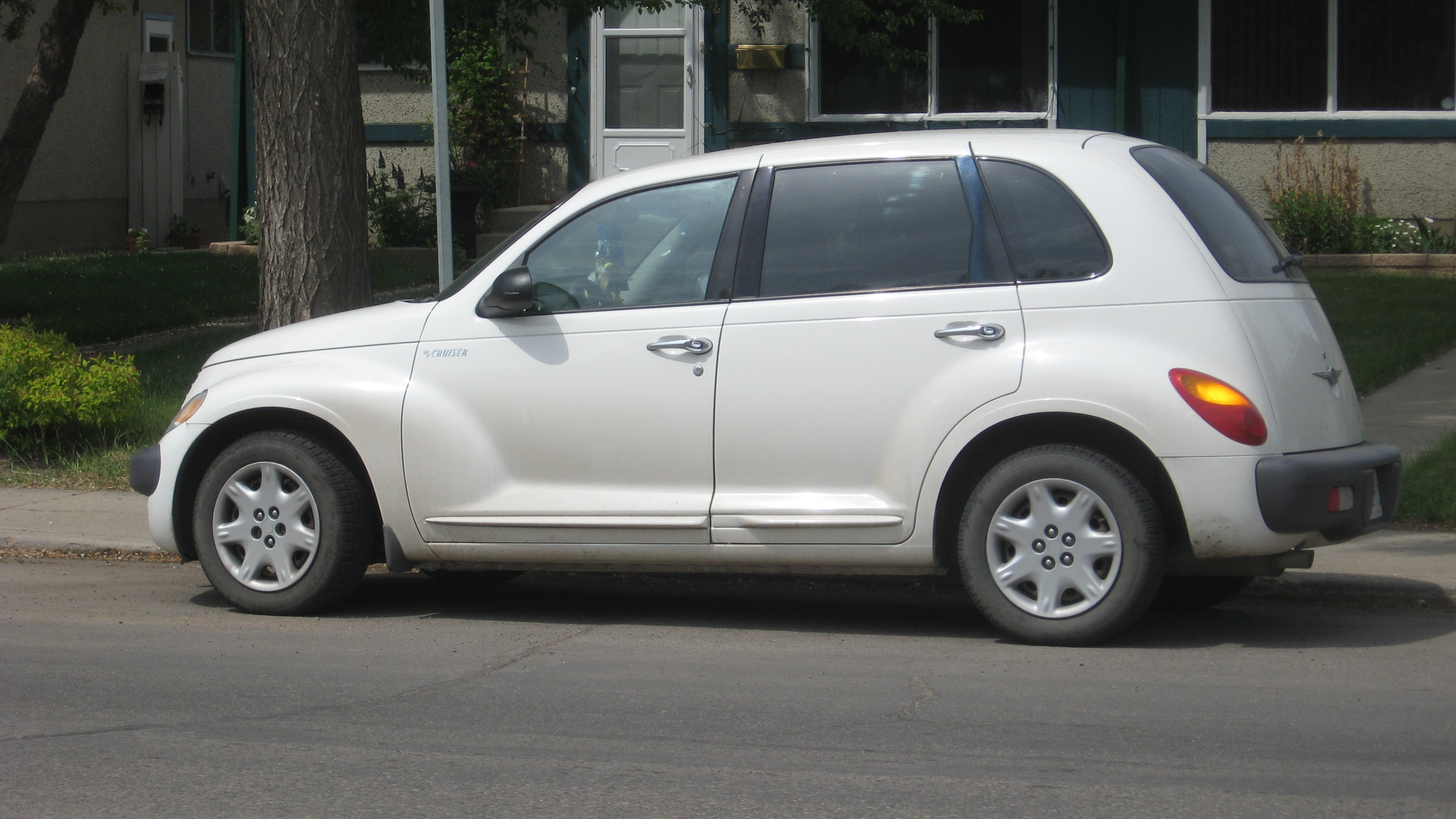 4-door side view